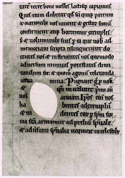 Az egyes kódexek pergamenoldalain látható eredeti lyukak elsősorban monostorokban készült kódexekben fordulnak elő: a szerzetesek valószínűleg nem engedhették meg maguknak, (vagy nem tartották fontosnak), hogy ne használják fel a hibás, a szárítás során megrongálódott lapokat. Ennek a XII. század végi kódexnek a másolója például gondosan körbeírta a lapon található lyukat. A kódex valószínűleg a winchcombe-i apátságban készült Gloucester megyében.